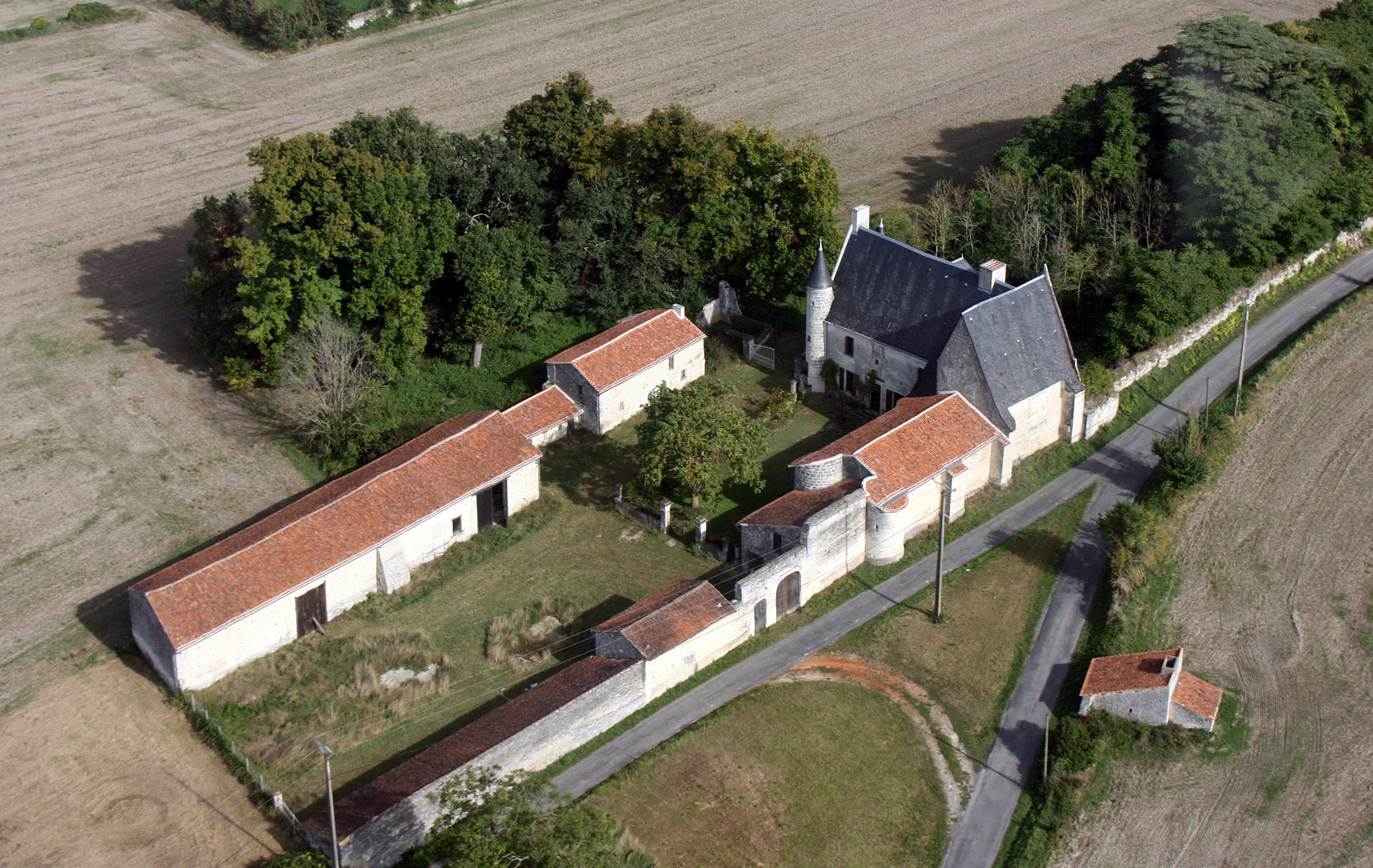 Manoir de Vayolles (Inscrit) .